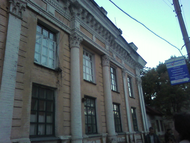 Kienesa w Charkowie